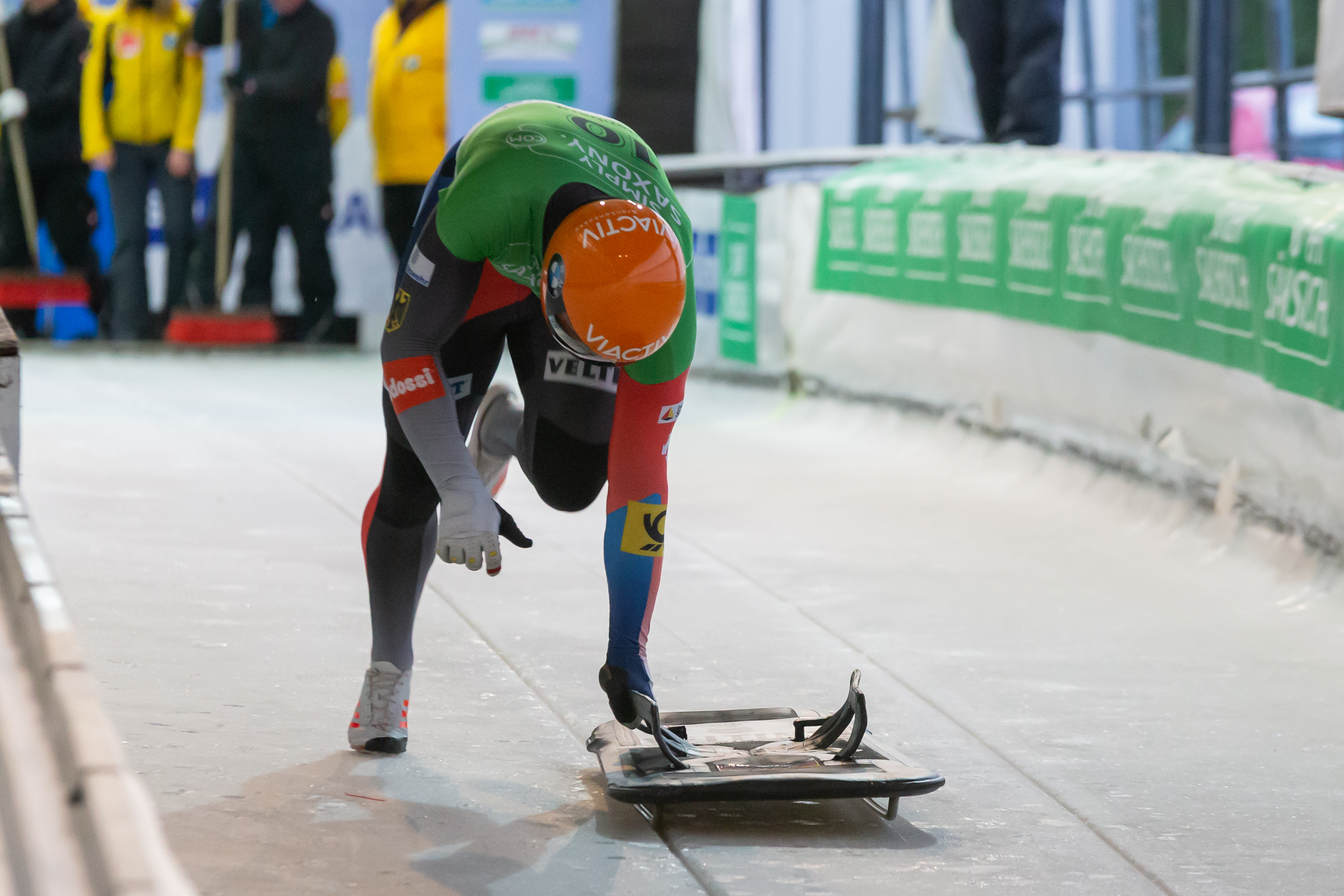 Deutsche Meisterschaften Skeleton; Alex Gassner (BSC Winterberg) beim Start